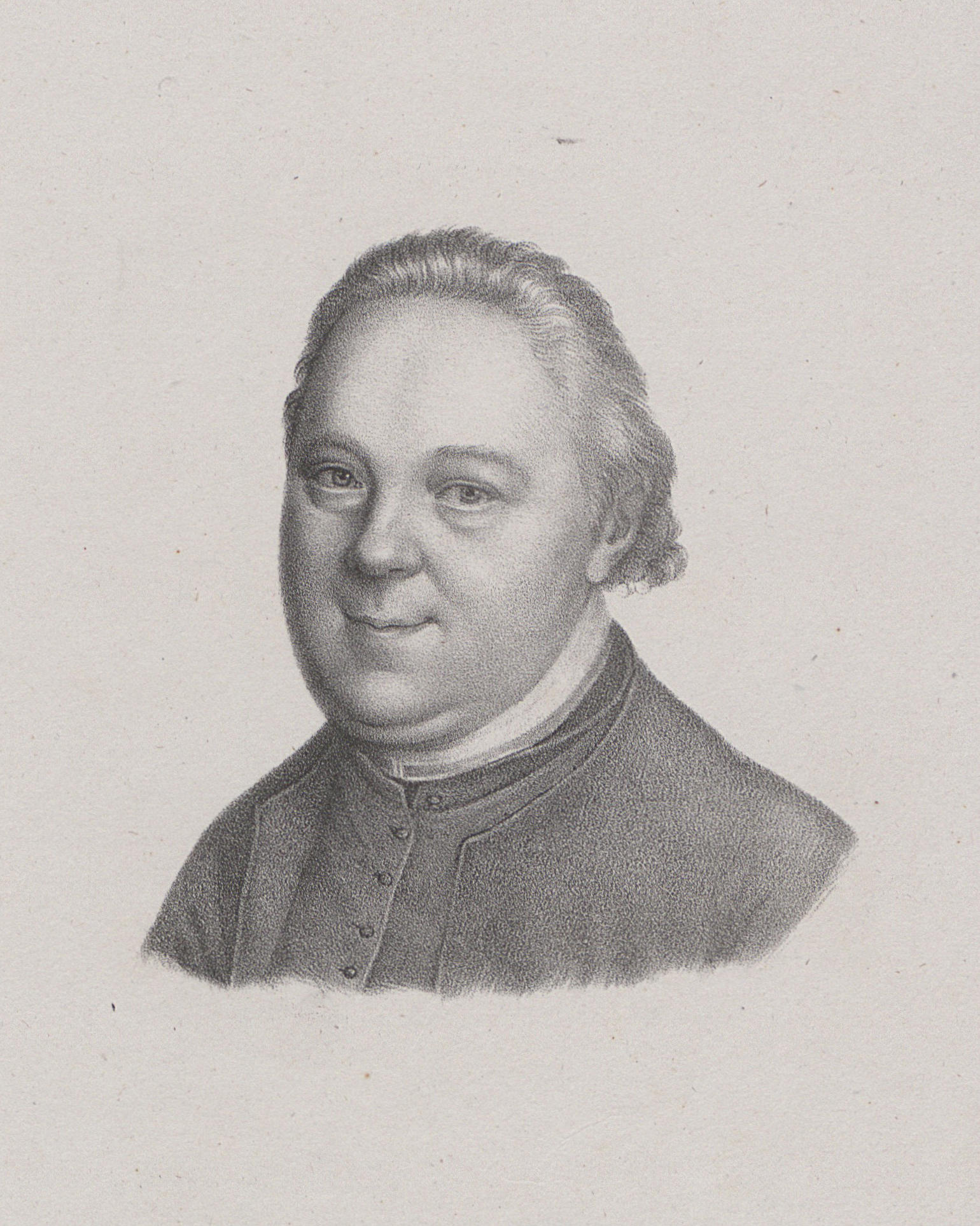 Беларуская (тарашкевіца): Партрэт Францішка Багамольца (Francišak Bahamolec)